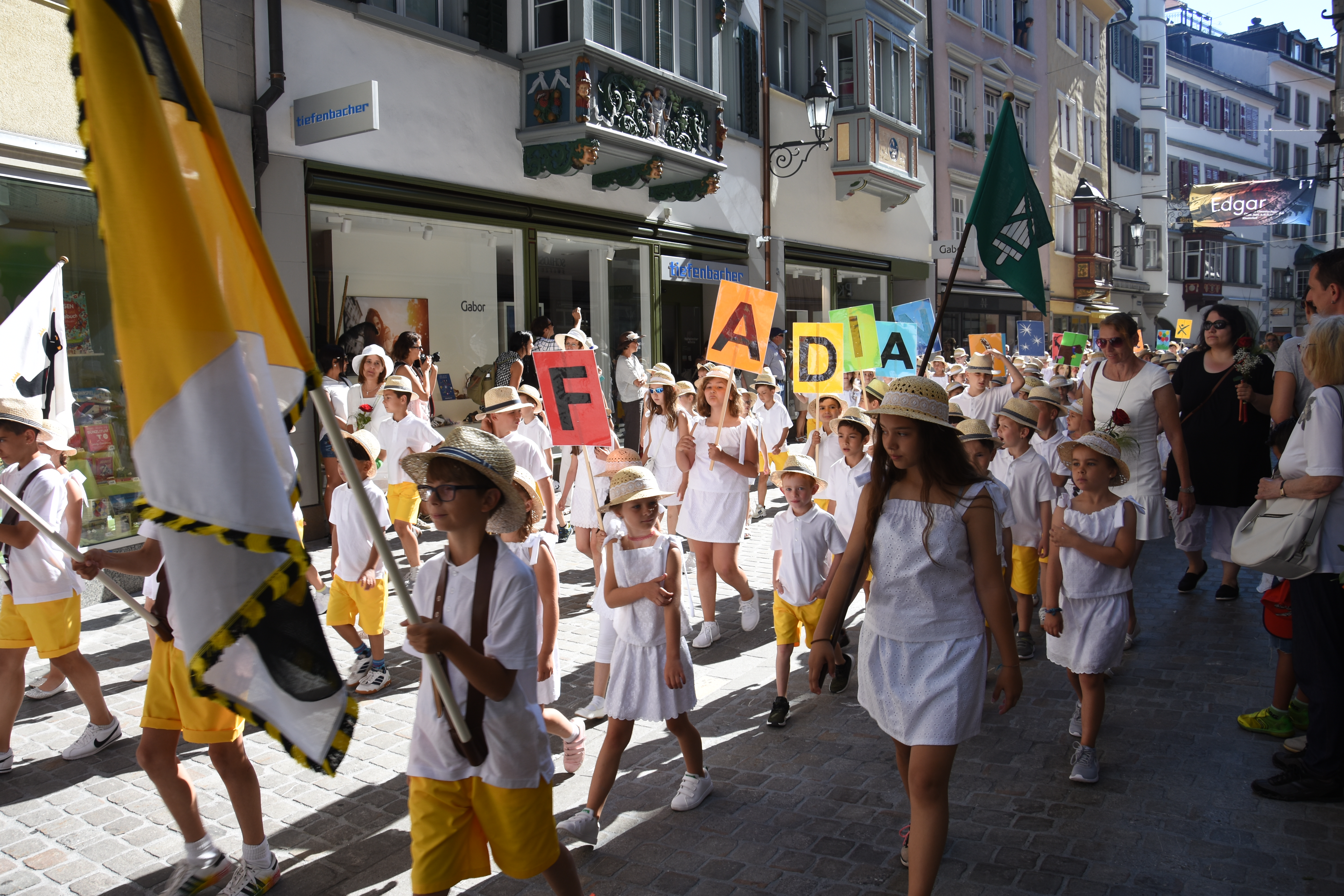 Farbenfrohe Schülerschar am Kinderfestumzug 2018 in St. Gallen